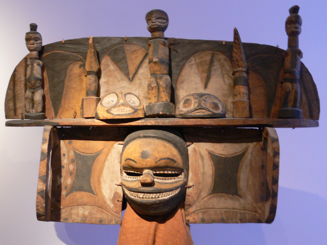 Stuttgart, Linden-Museum Ahnenmaske des Ekpo-Bundes; Ibibio (Südnigeria), 19. Jh., Holz; Inv. Nr. 28421